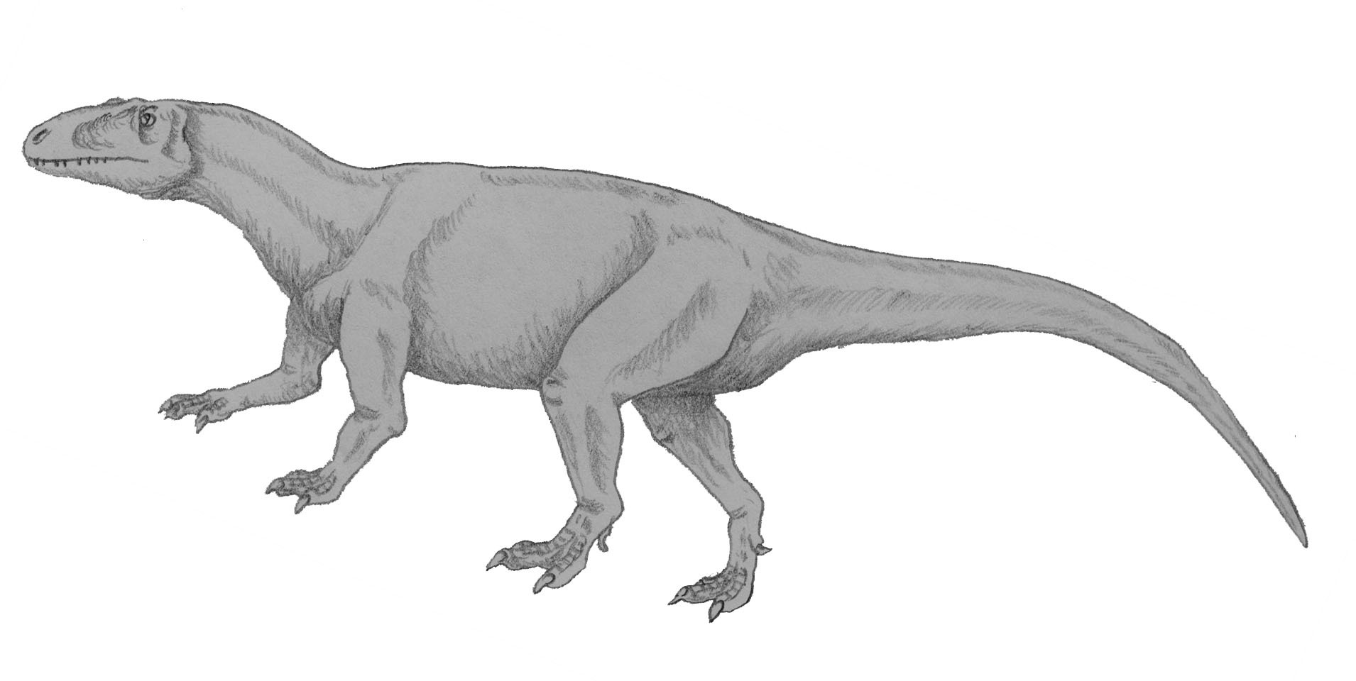 Xuanhanosaurus qilixiaensis, a bizarre theropod dinosaur from China